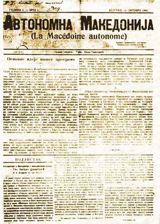 Брой на вестник "Автономна Македония"